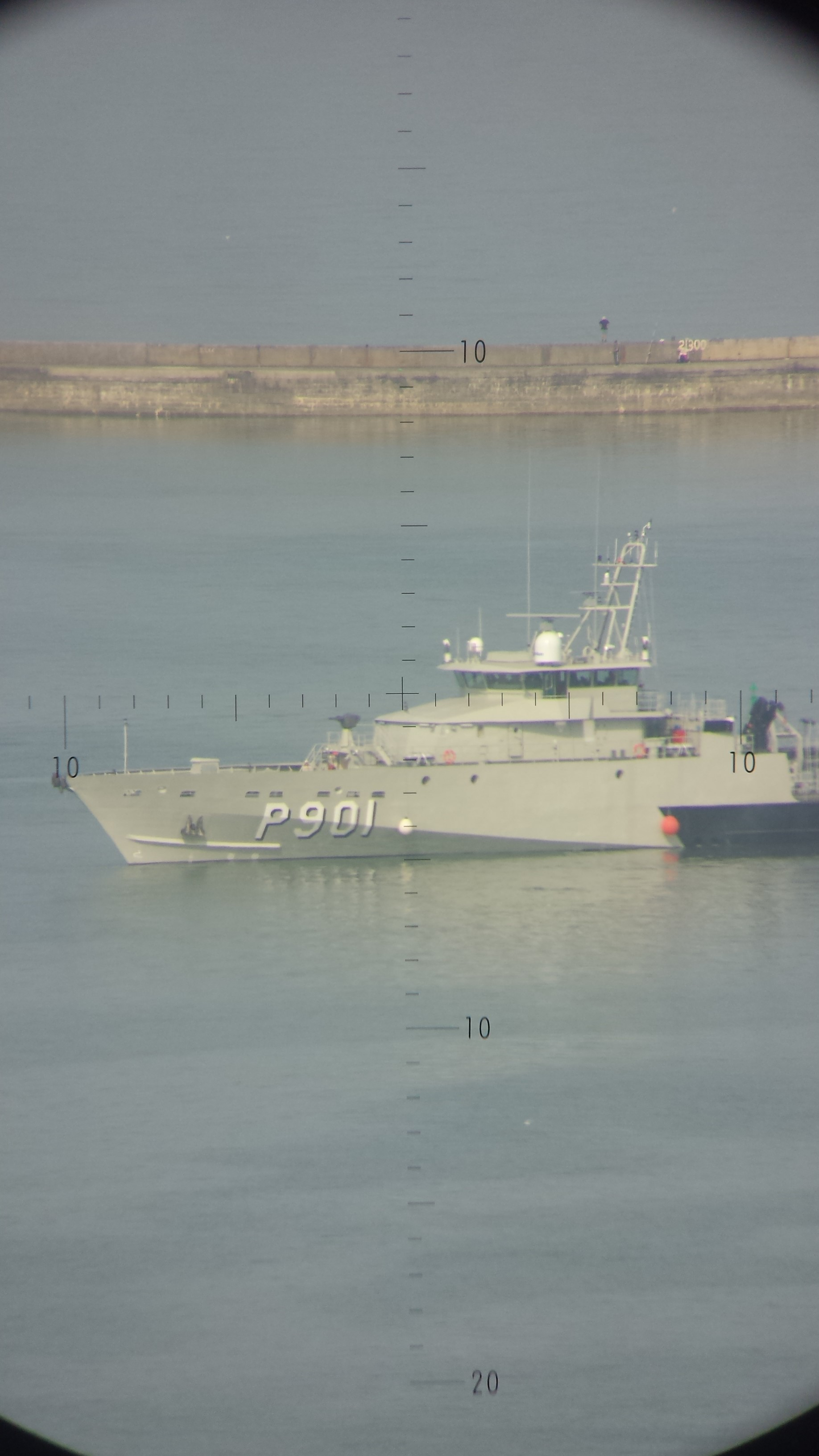 BNS Castor au port de Boulogne